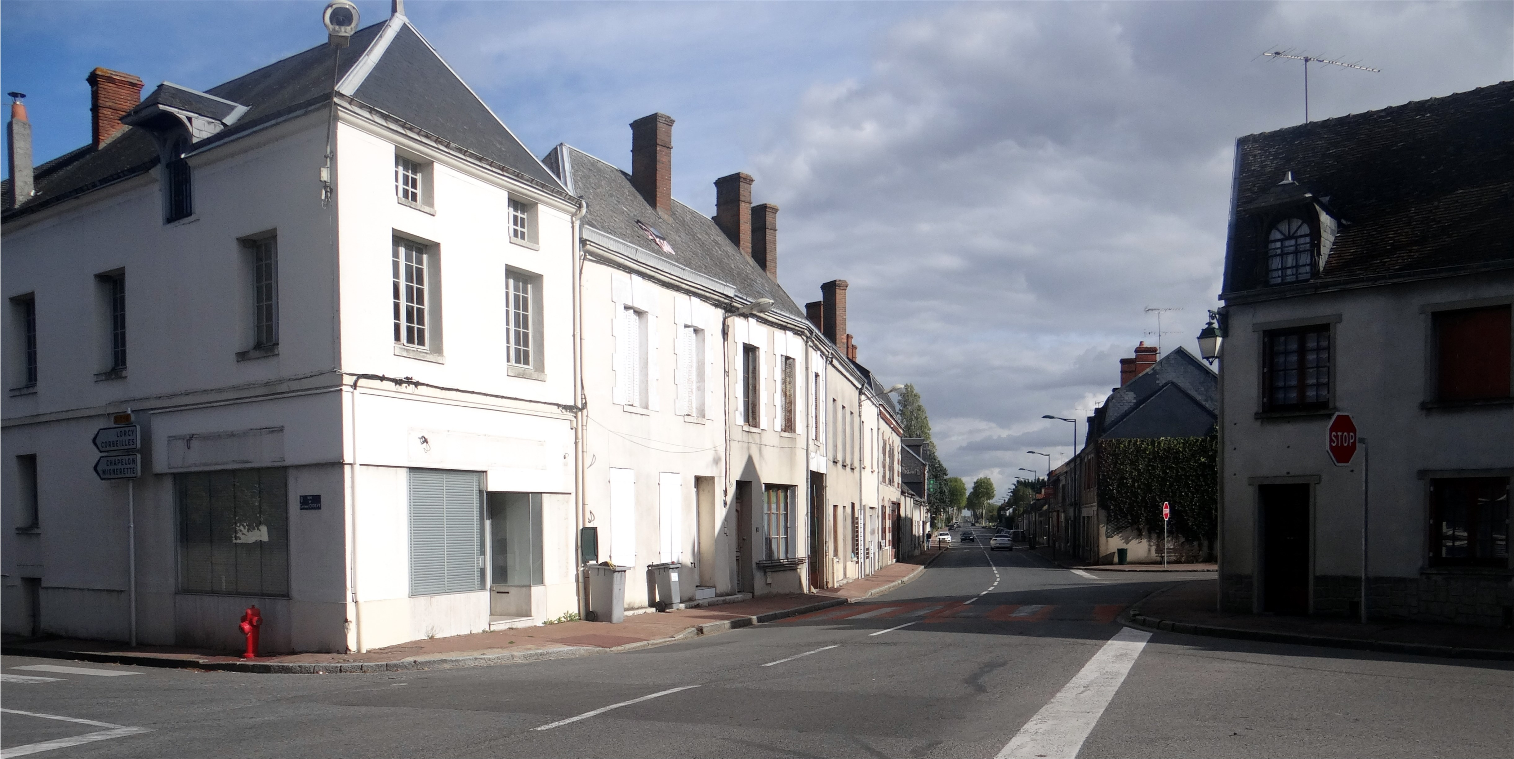 Départementale D 2160 vers Saint-Maurice-sur-Fessard, Ladon, Loiret, France.